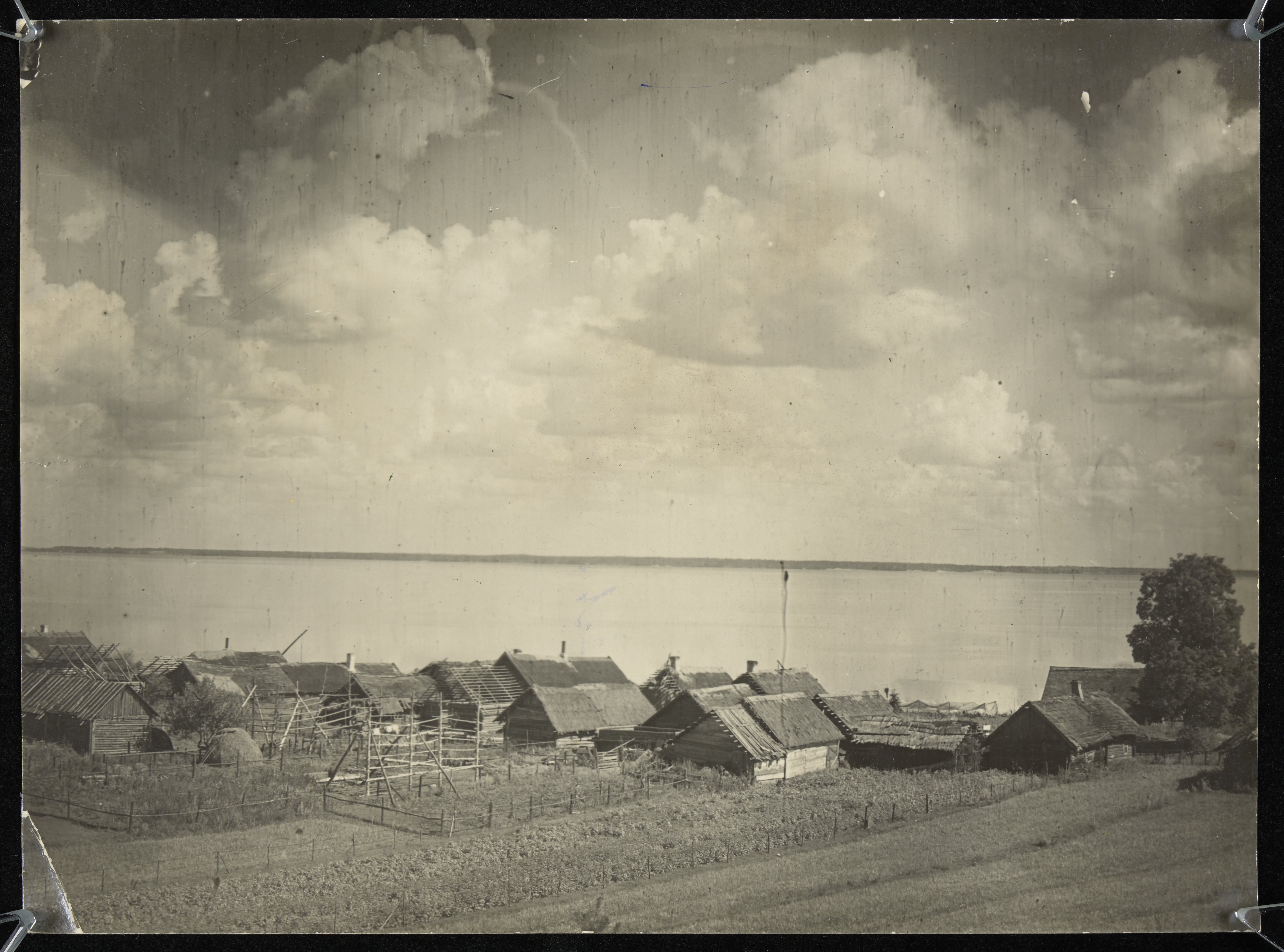 Беларуская (тарашкевіца): Наносы (Nanosy), Нарач (Narač)